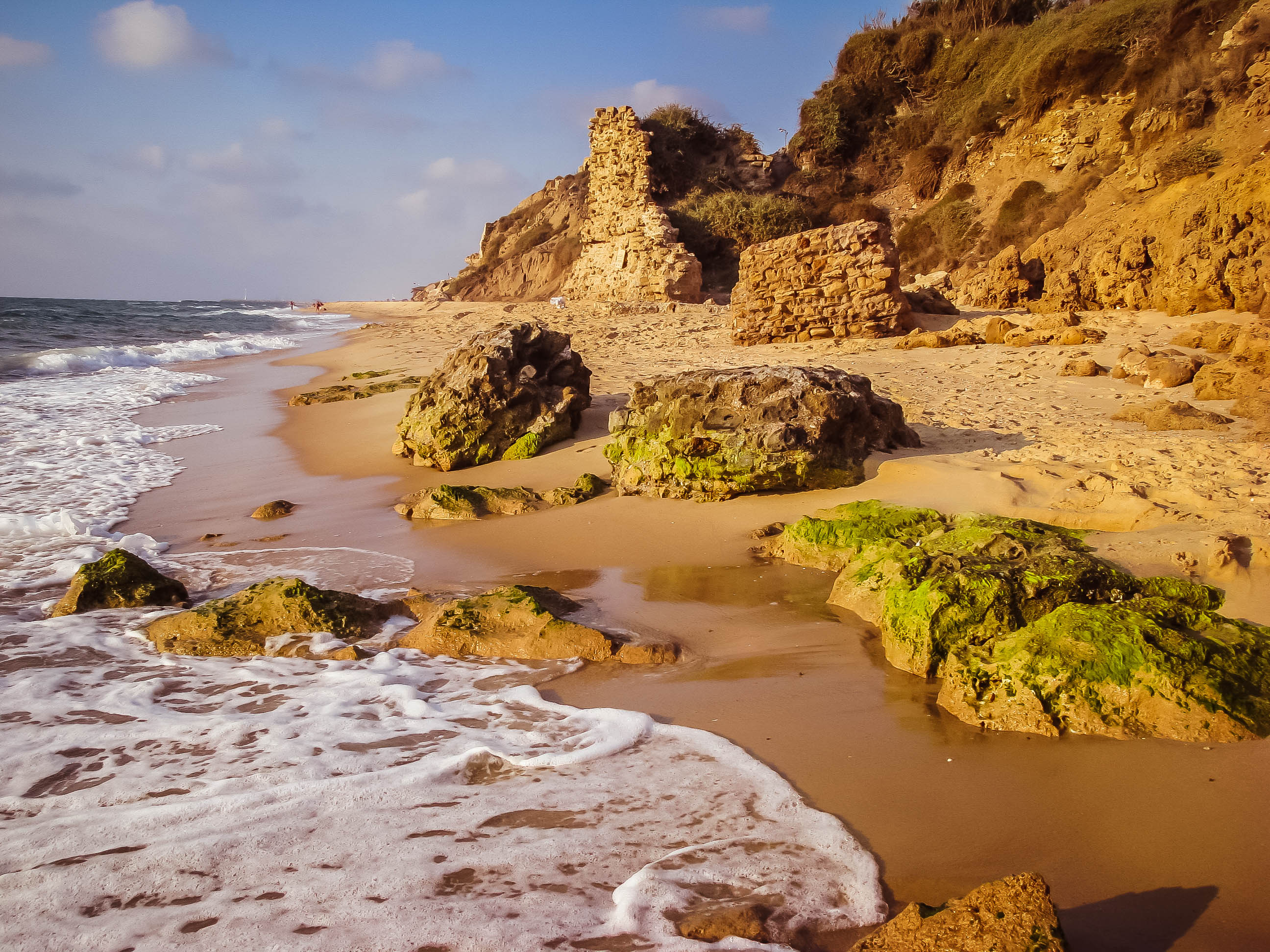 הריסות נשטפות על חוף הגן הלאומי באשקלון